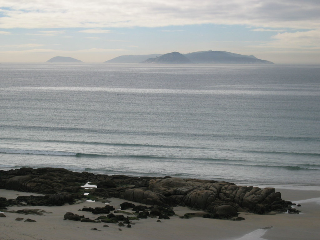 Illas Ons, vistas desde a praia da Lanzada